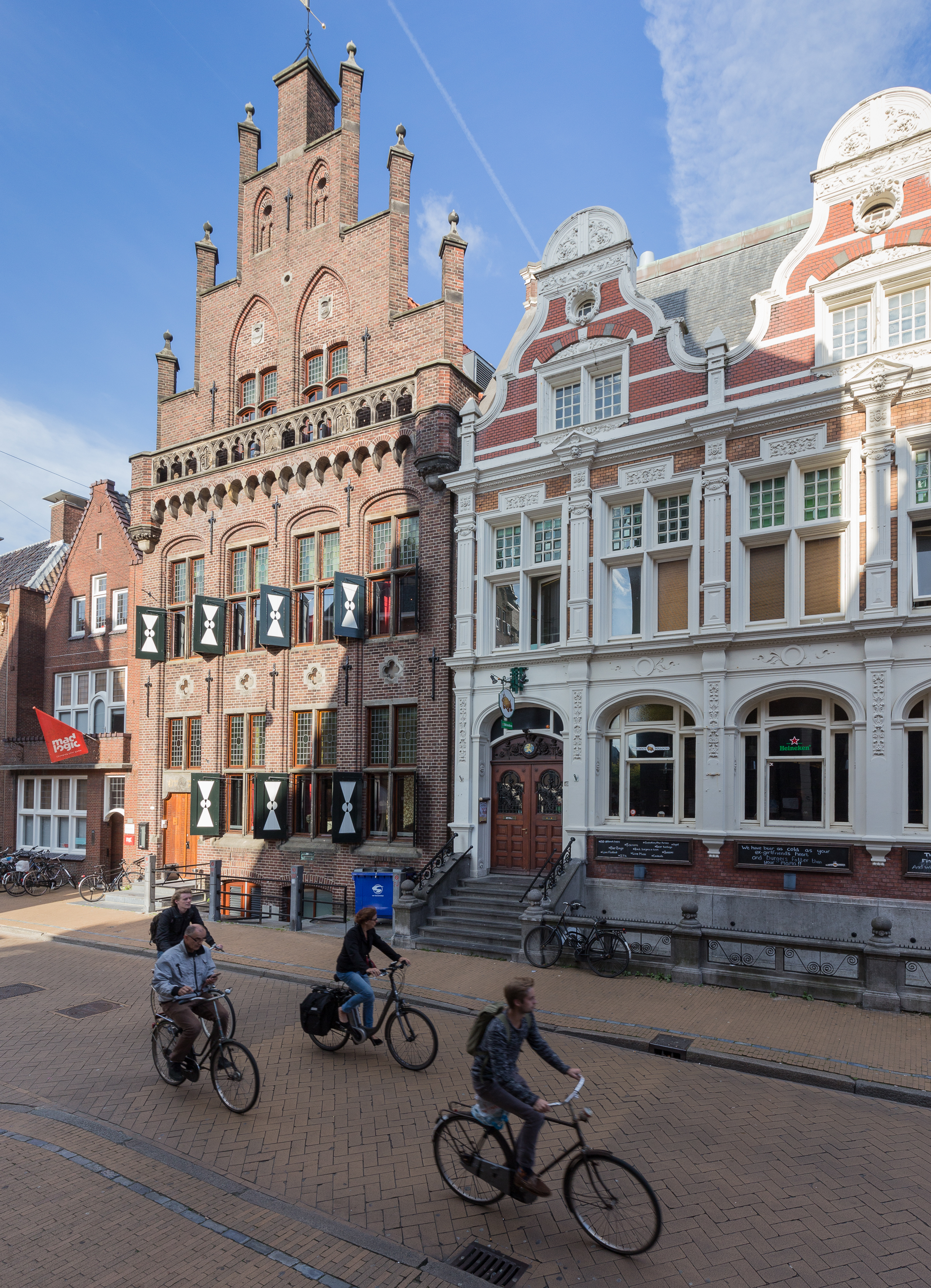 Groningen Oude Boteringestraat 19 & 17